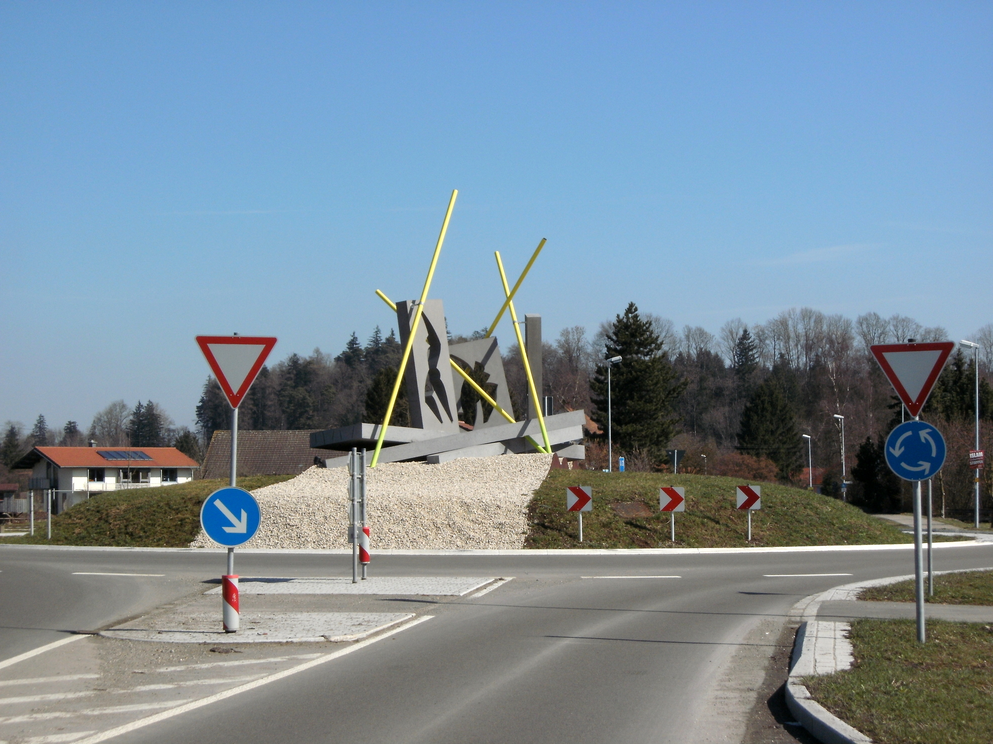 Kreisverkehr Kunstwerk Illerfößerei